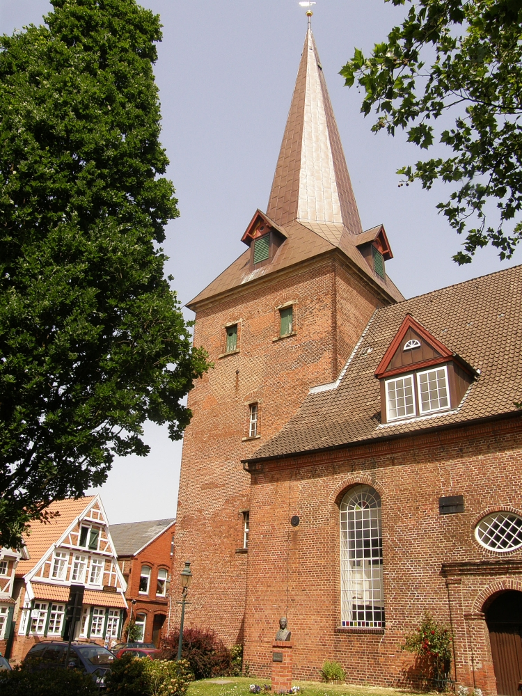 Die Südseite St. Severi-Kirche in Otterndorf